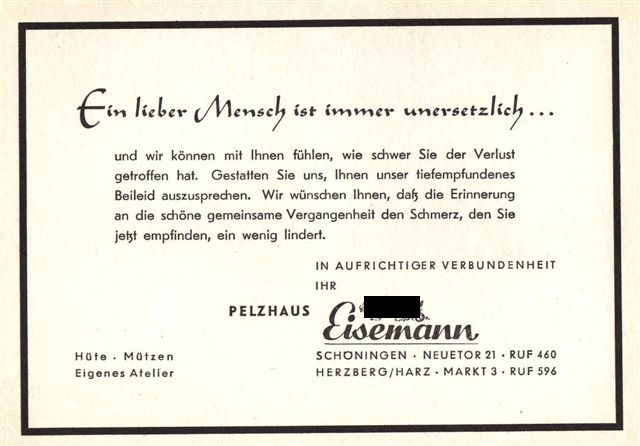 Gedruckte Beileidskarte vom Pelzhaus Eisemann. Ein lieber Mensch ist immer unersetzlich... und wir können mit Ihnen fühlen, wie schwer Sie der Verlust getroffen hat. Gestatten Sie uns , Ihnen unser tiefempfundenes Beileid auszusprechen. Wir wünschen Ihnen, daß die Erinnerung an die gemeinsame Vergangenheit den Schmerz, den Sie jetzt empfinden, ein wenig lindert. In aufrichtiger Verbundenheit Ihr Pelzhaus Eisemann, Hüte, Mützen, eigenes Atelier, Schöningen, Neuetor 21; Herzberg/Harz, Markt 3